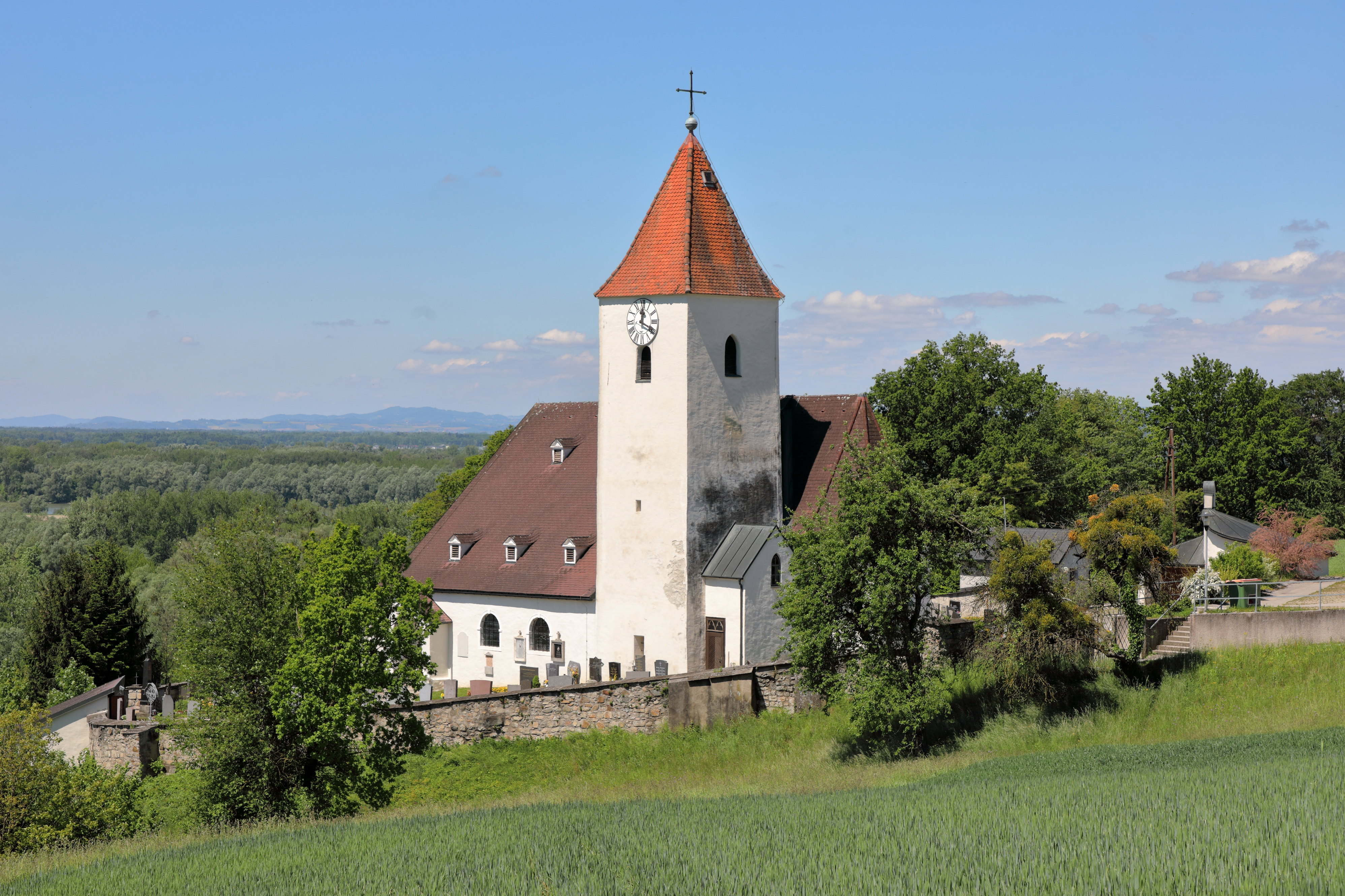 Südostansicht der Pfarrkirche hl. Nikolaus in Ardagger Markt, ein Ortsteil der niederösterreichischen Marktgemeinde Ardagger.Die Kirche befindet sich hoch über dem Ort und ist von einem Friedhof umgeben. Der Sakralbau ist romanischen Ursprungs, hat einen gotischen Chor und einen massiven mittelalterlichen Südturm.